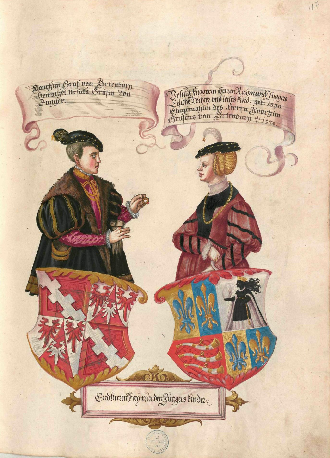 Geheimes Ehrenbuch der Fugger, hergestellt in der Werkstatt Jörg Breu d. J., 1545–1549 Portrait- und Wappendarstellung